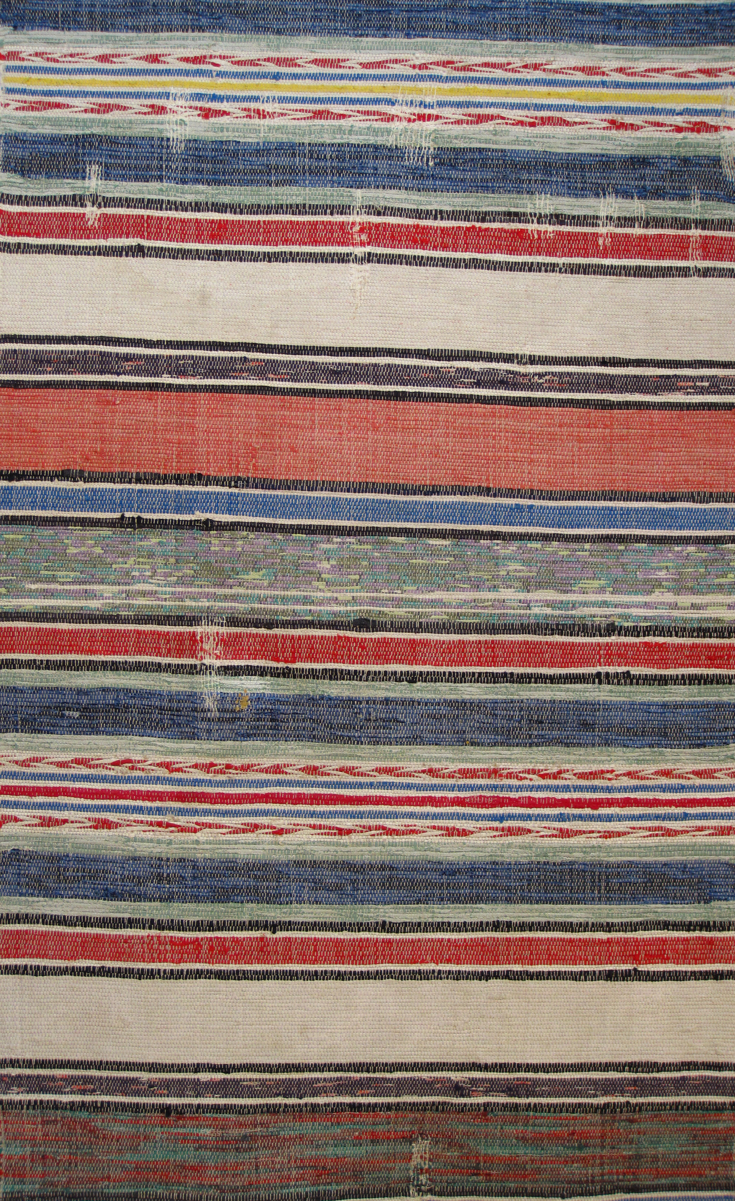 Allgäuer Bändelteppich um 1900